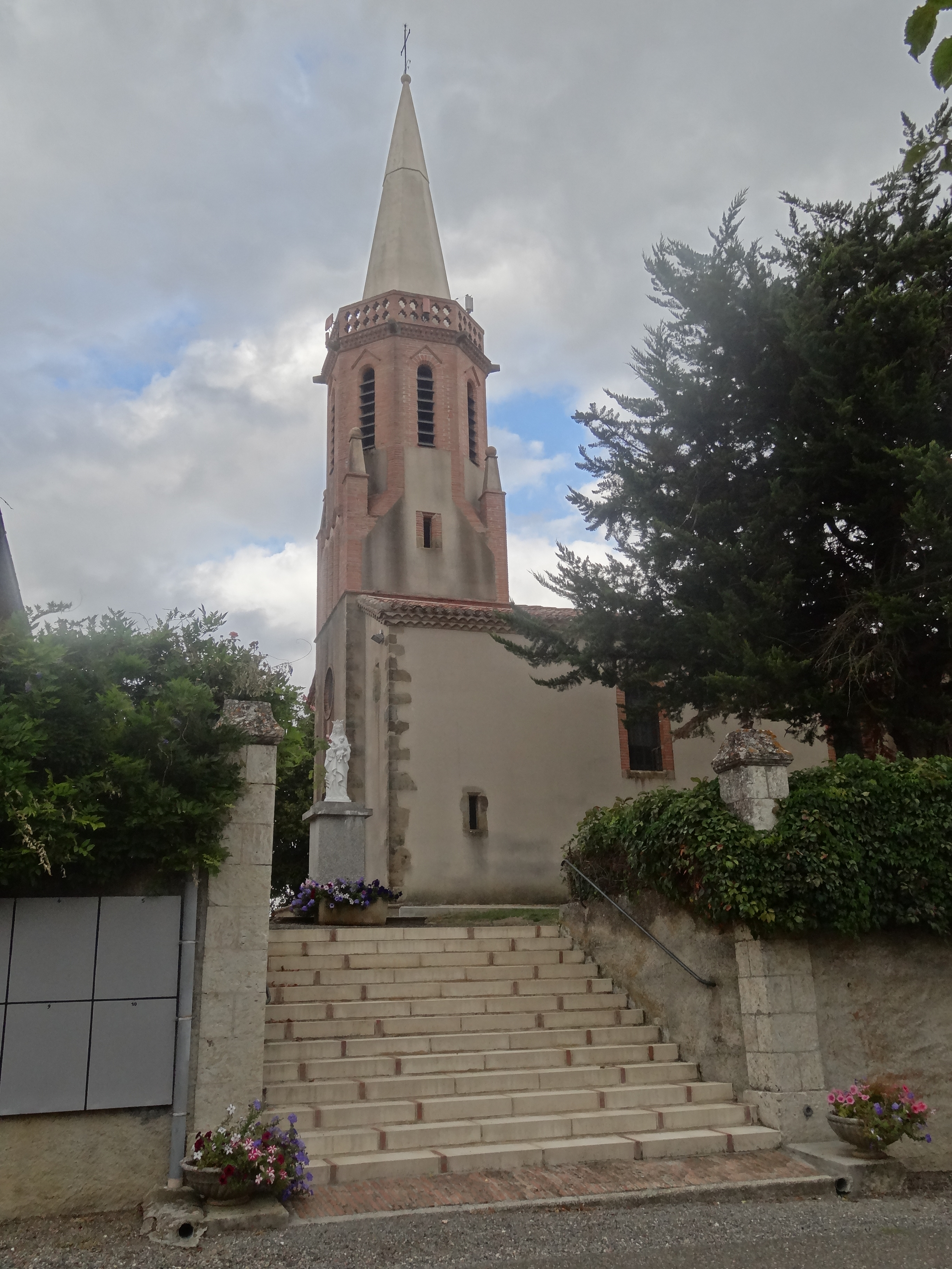 Clocher de l'église de Saint-Caprais dans le Gers.